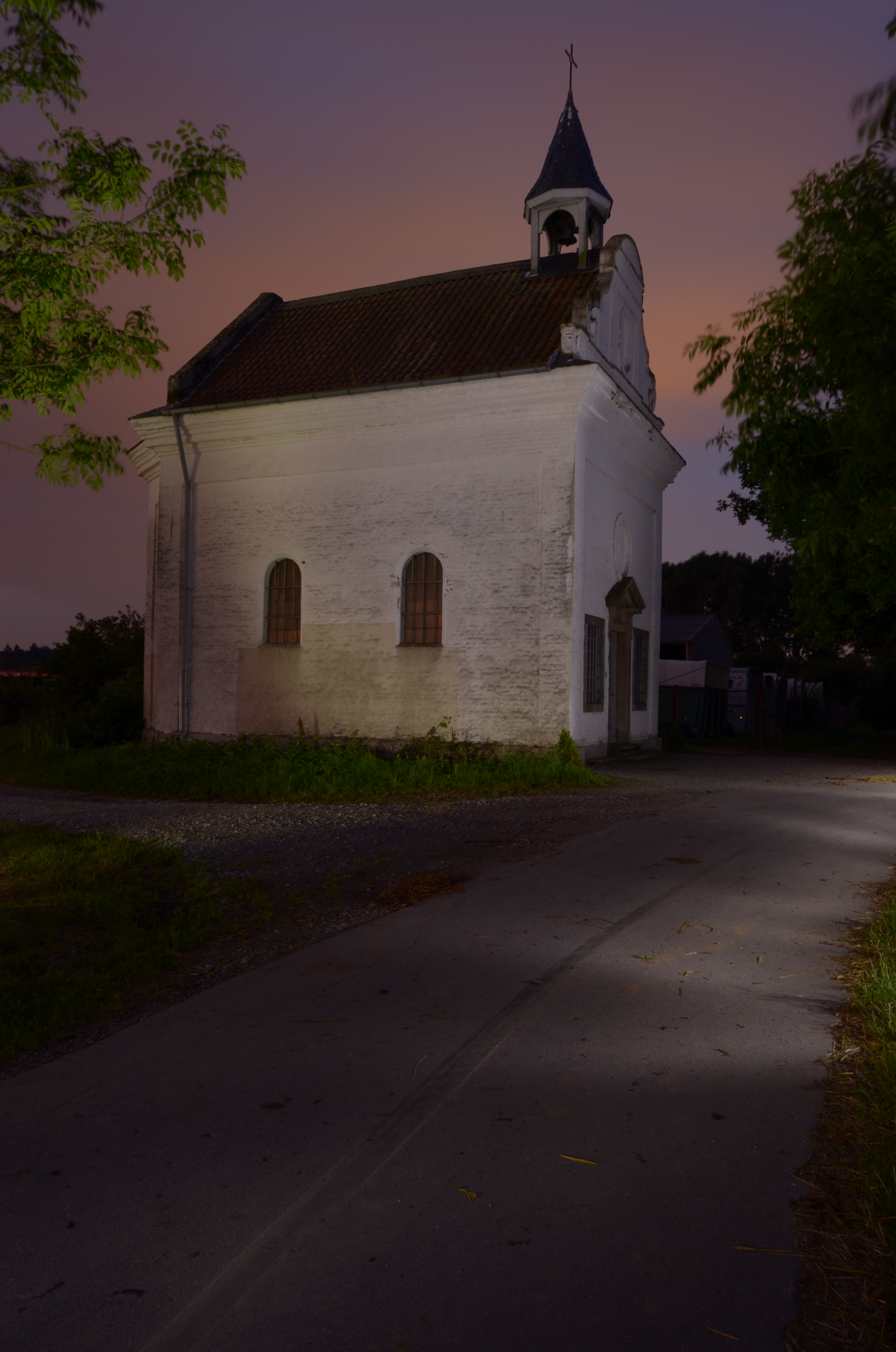 Hubertuskapelle in Düsseldorf-Angermund bei Nacht